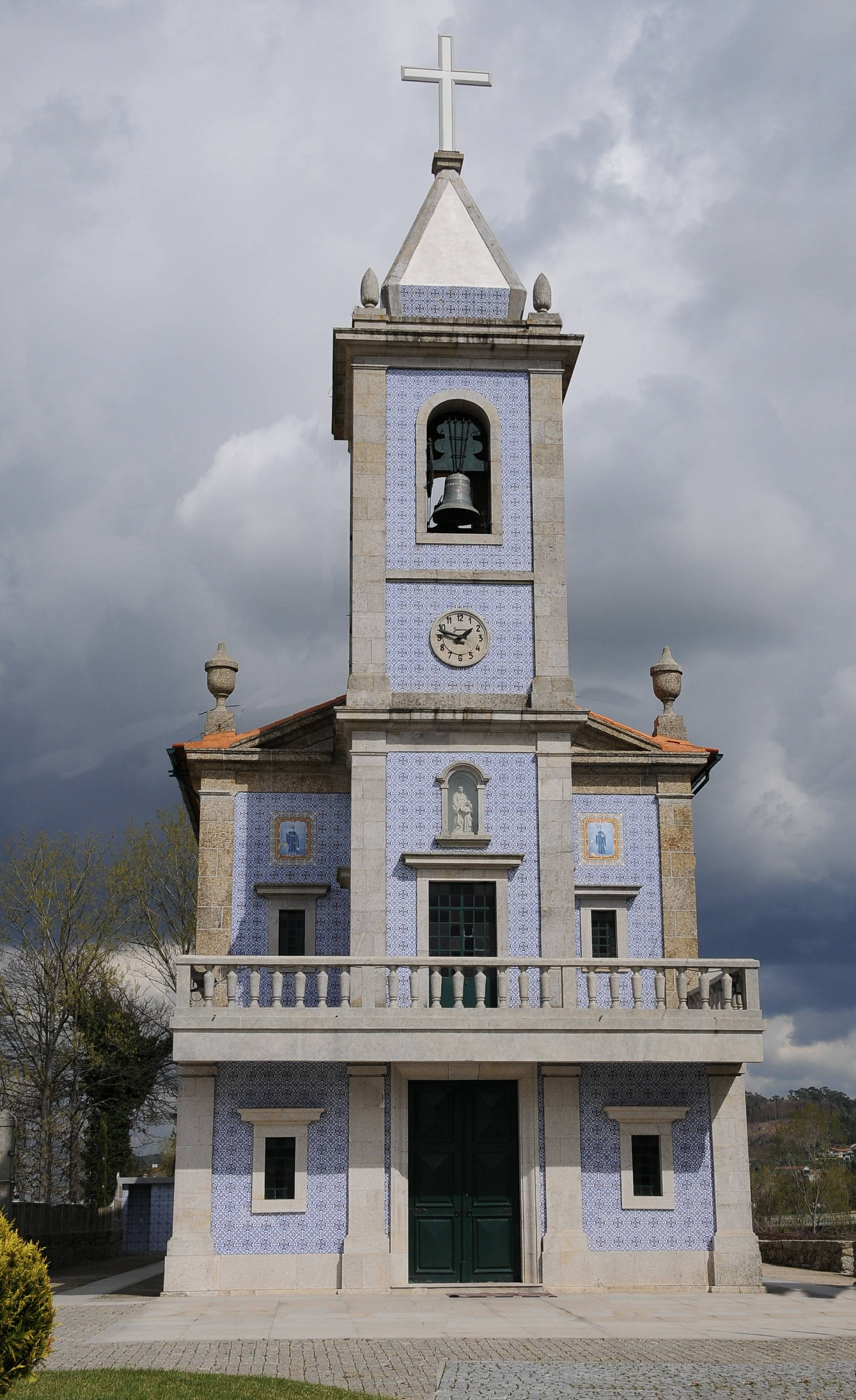 Vimieiro Church, in Braga, Portugal